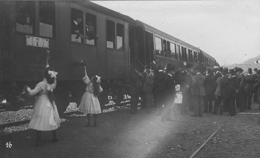 Eröffnungszug der Bodensee-Toggenburg-Bahn (BT) und der Rickenbahn (SBB) in Degersheim